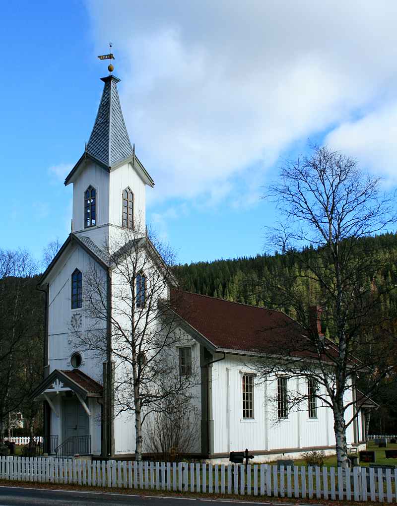 Engerdal church, Norway